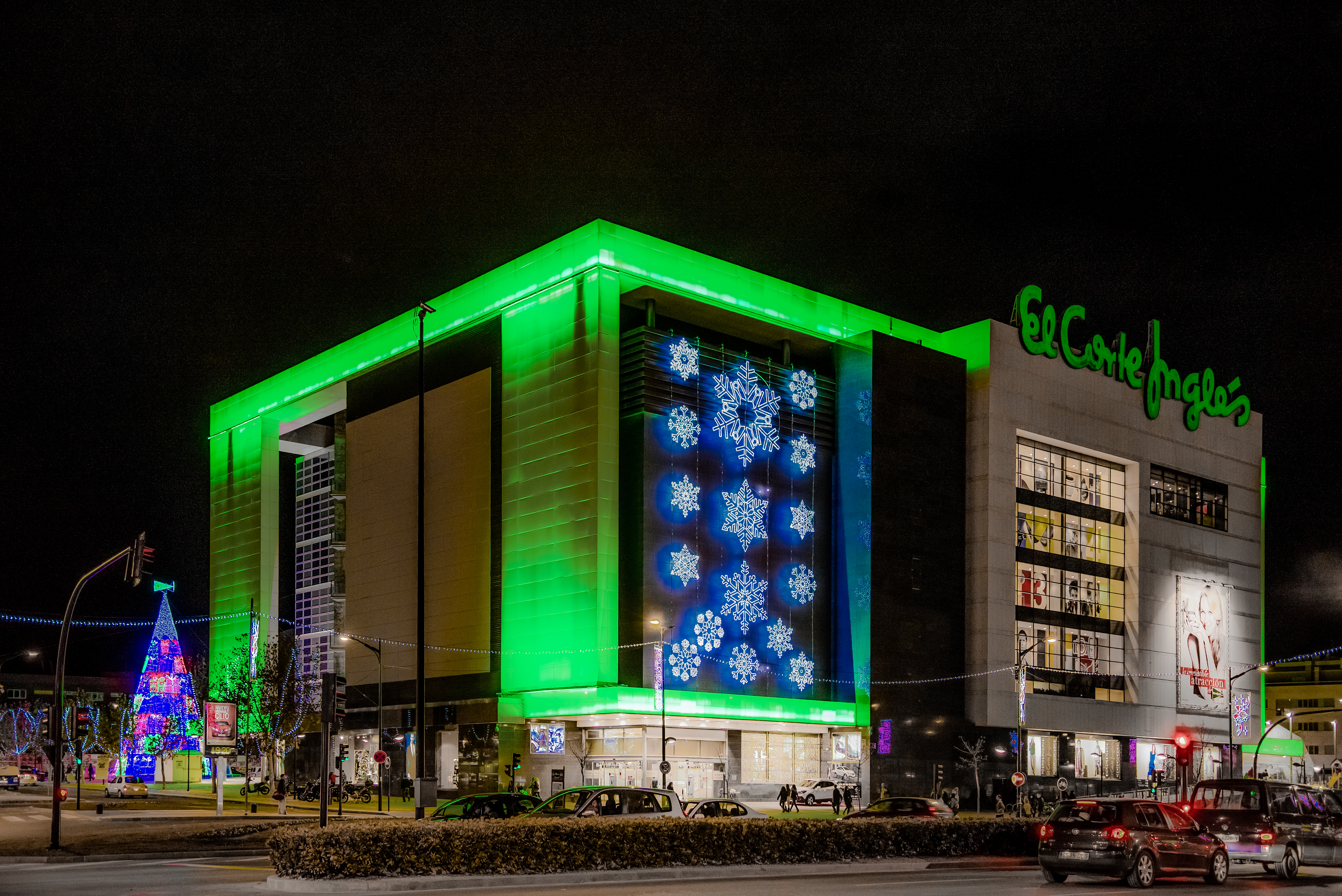 Albacete nocturno